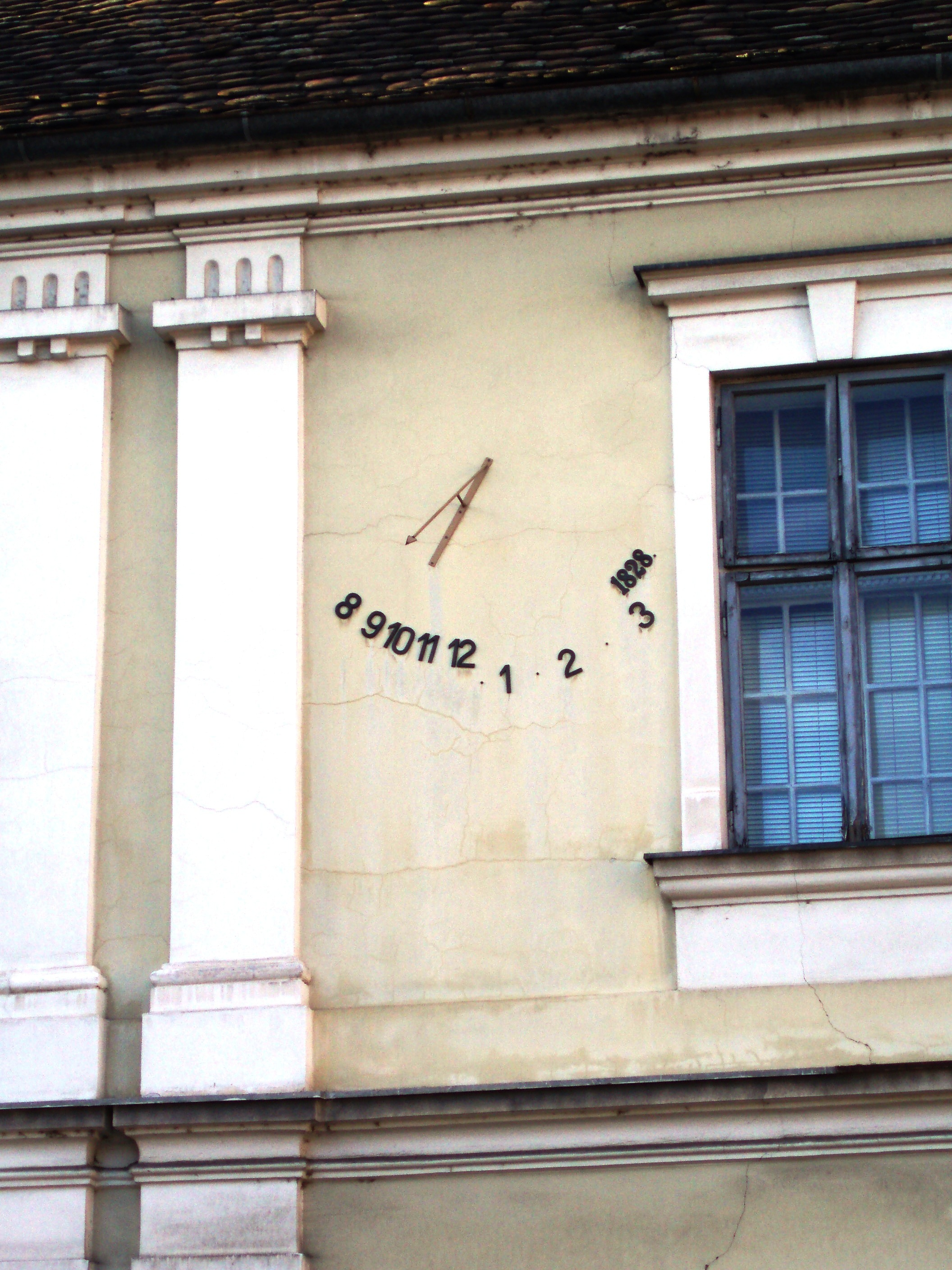 Kuća sa sunčanim satom, sunčani sat na fasadi zgrade, autor fotografije: Nicolo